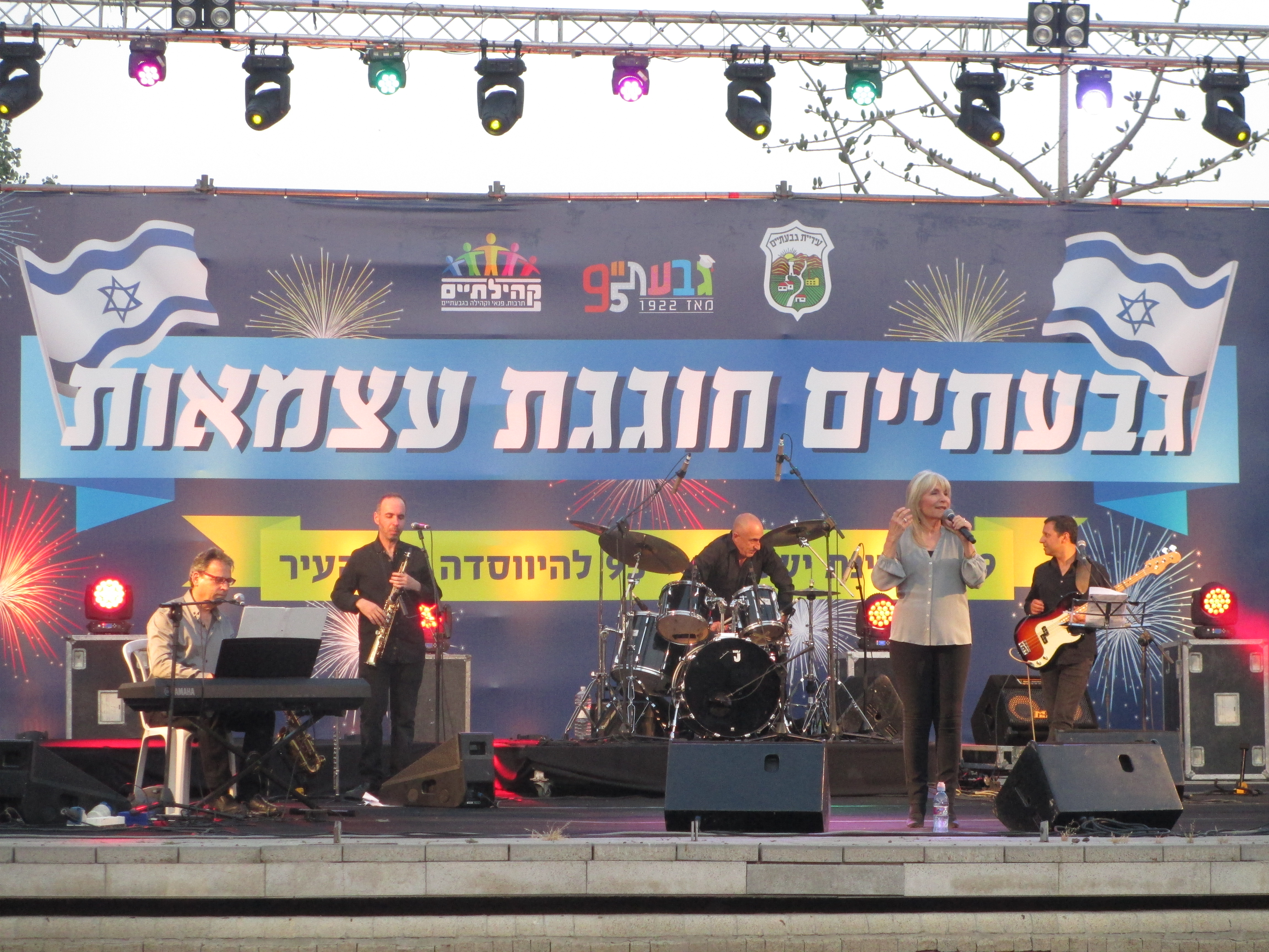 אילנית בהופעה בפארק גבעתיים, יום העצמאות תשע"ז, 2017